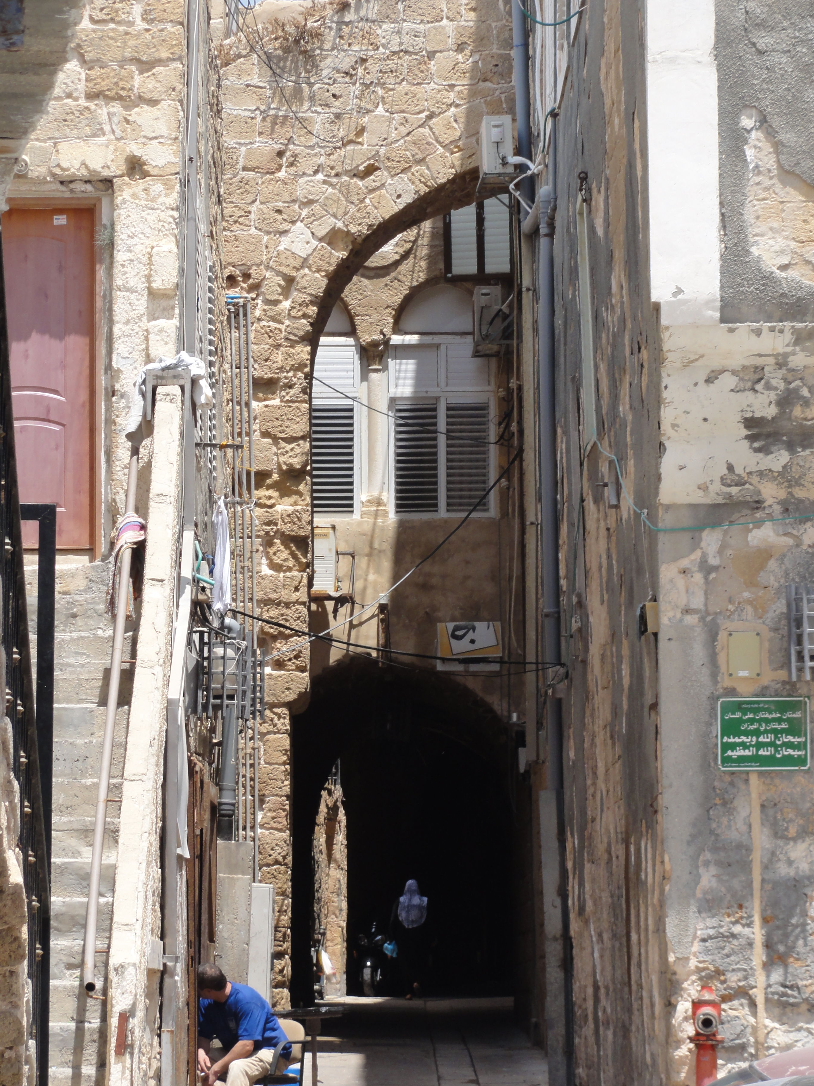 Akko, Israel. Info GPS data may be inaccurate. EXIF data regarding date and time may be inaccurate.